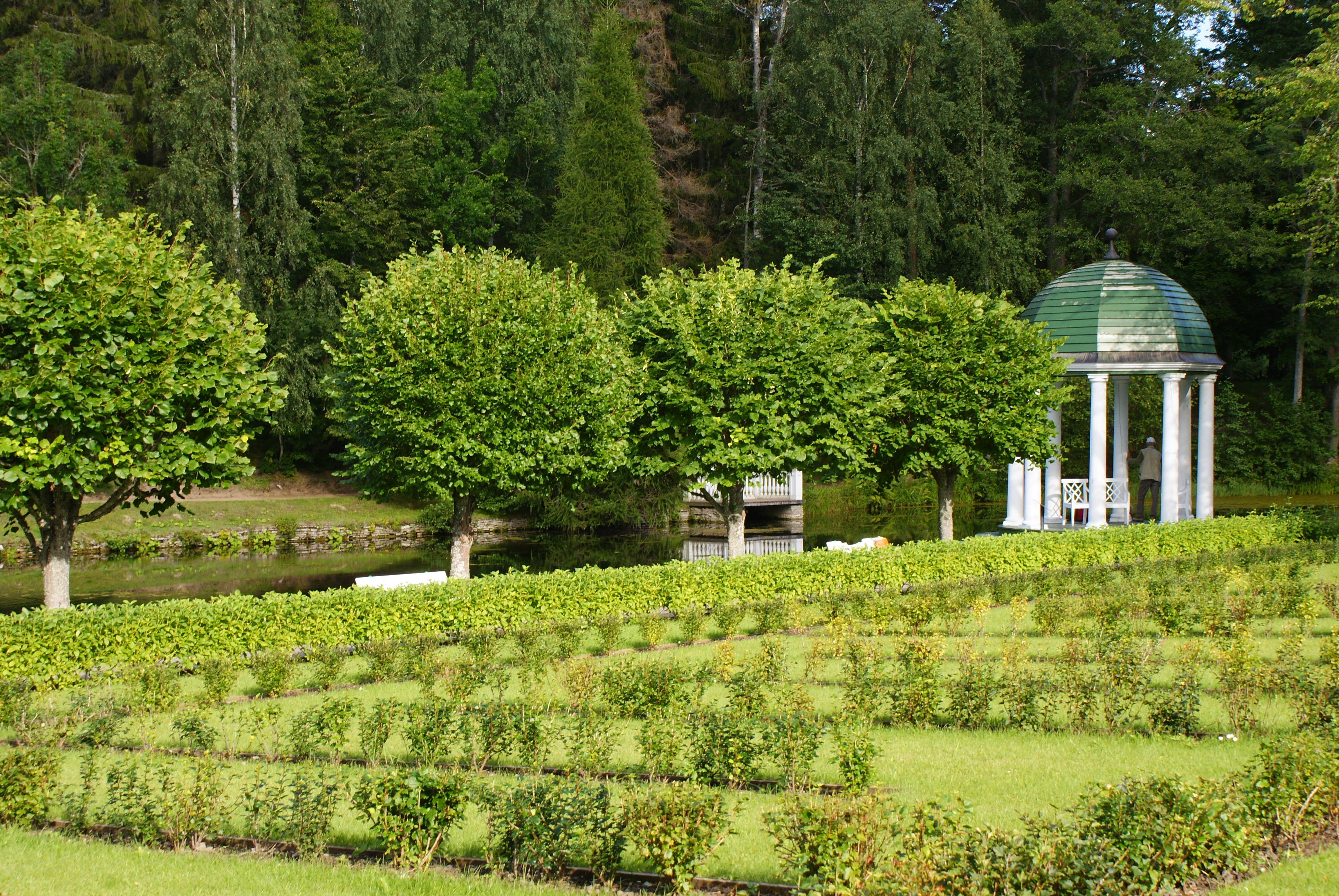 Palmse mõisa pargirotund